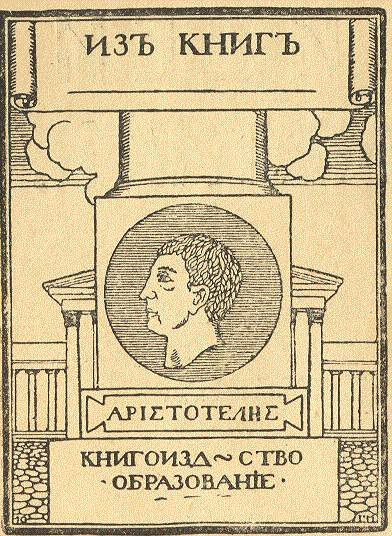 Экслибрис книгоиздательства «Образование»